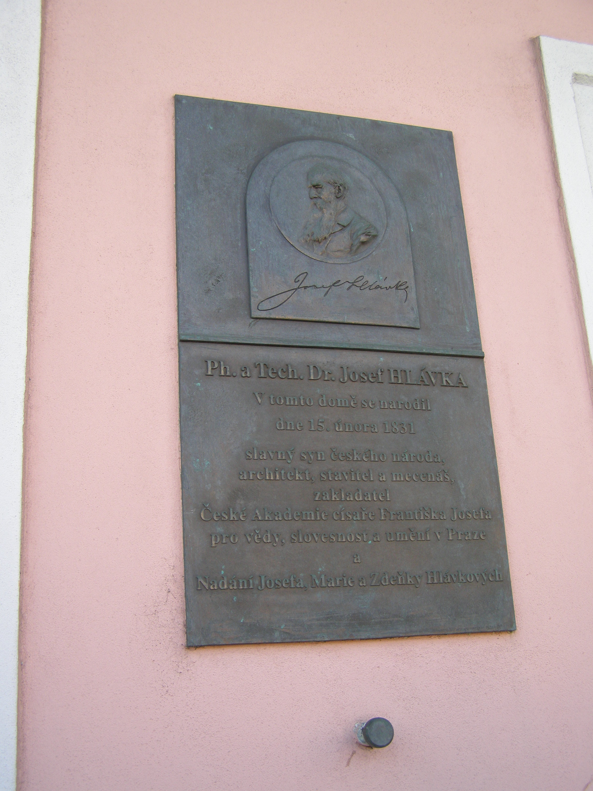 Pamětní deska Josefa Hlávky (* 1831 – 1908), českého architekta, stavebního podnikatele, politika a mecenáše na jeho rodném domě v Přešticích.